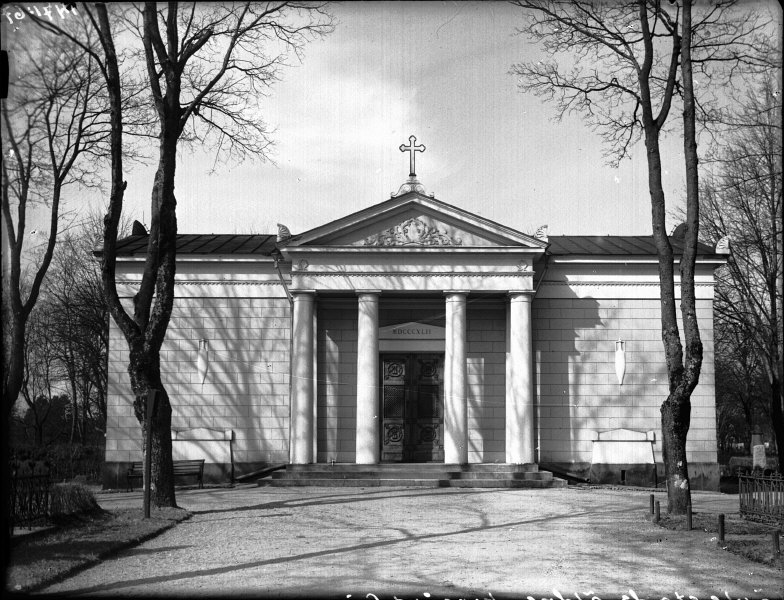 Gravkor för släkterna Elfbrink, Elfstrand och Göransson. Invigt 1842. Kategori: (01) Exteriörer, detaljer Gravkor för släkterna Elfbrink, Elfstrand och Göransson. Invigt 1842.